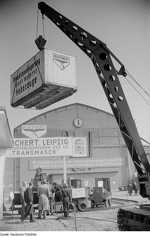 Original image description from the Deutsche Fotothek Kran